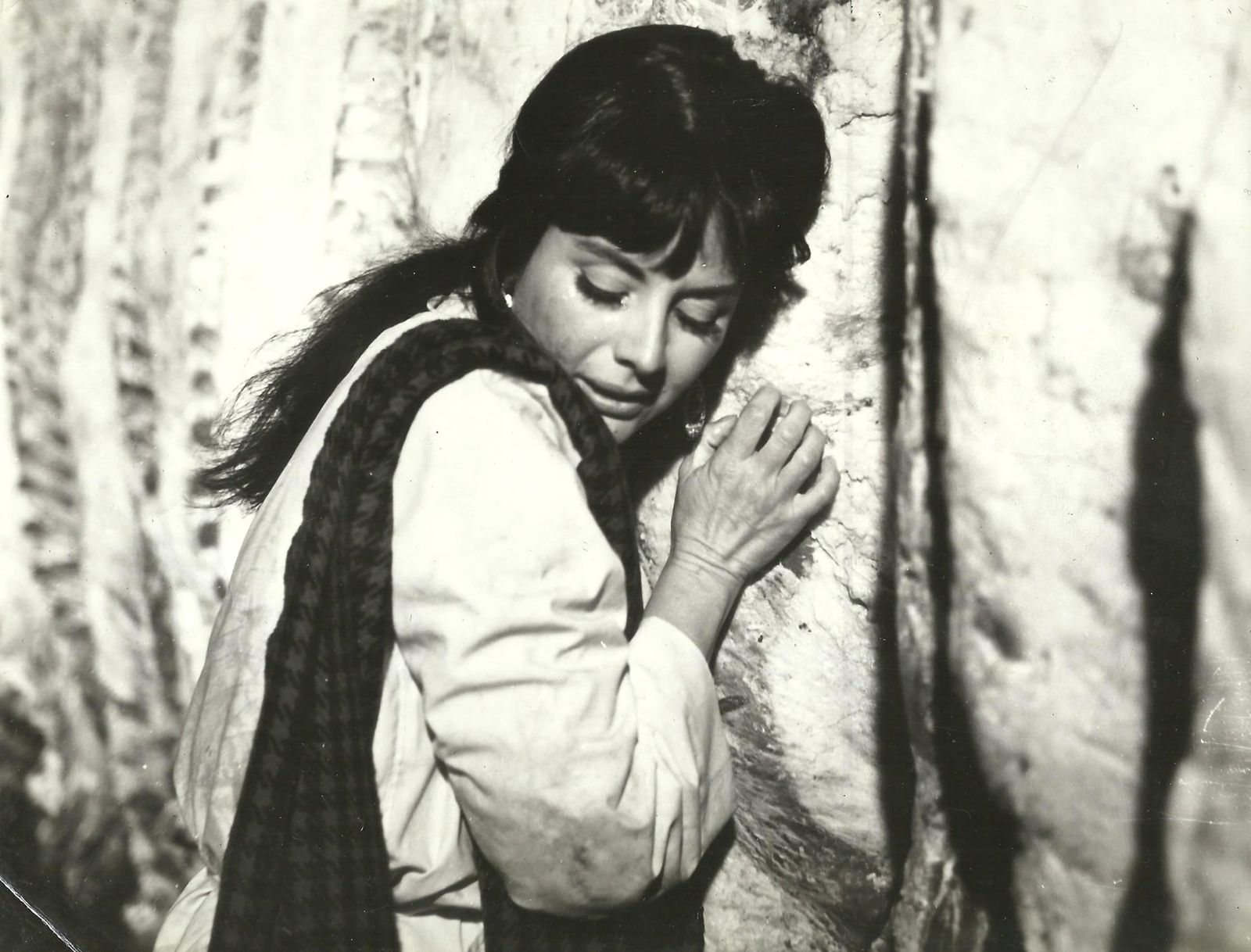 Isabel Sarli en Carne, película de 1968.